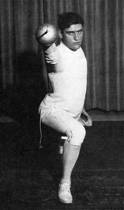 Hans Drakenberg